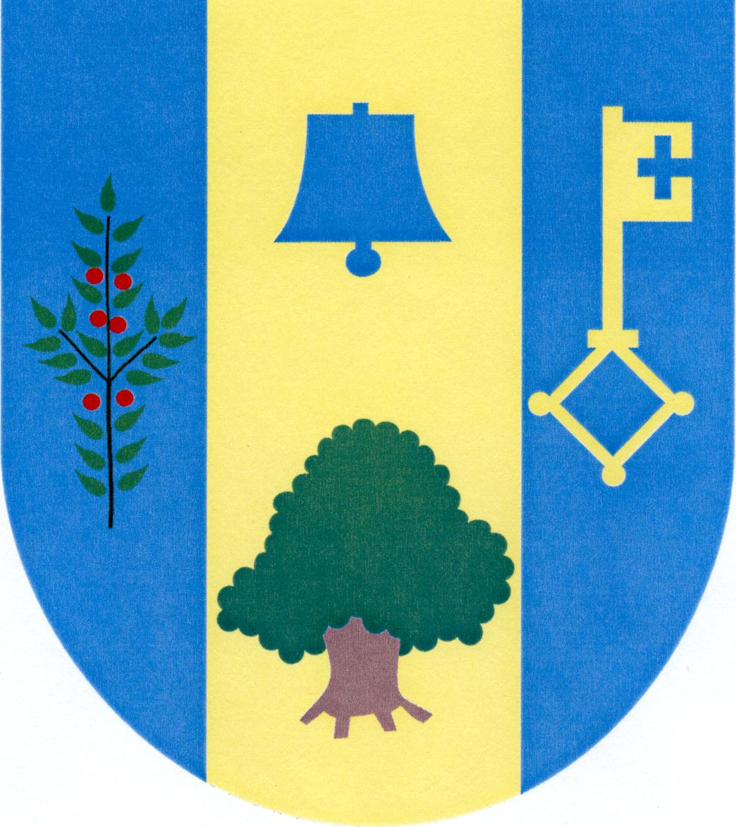 Znak obce Vilémovice (okres Havlíčkův Brod)